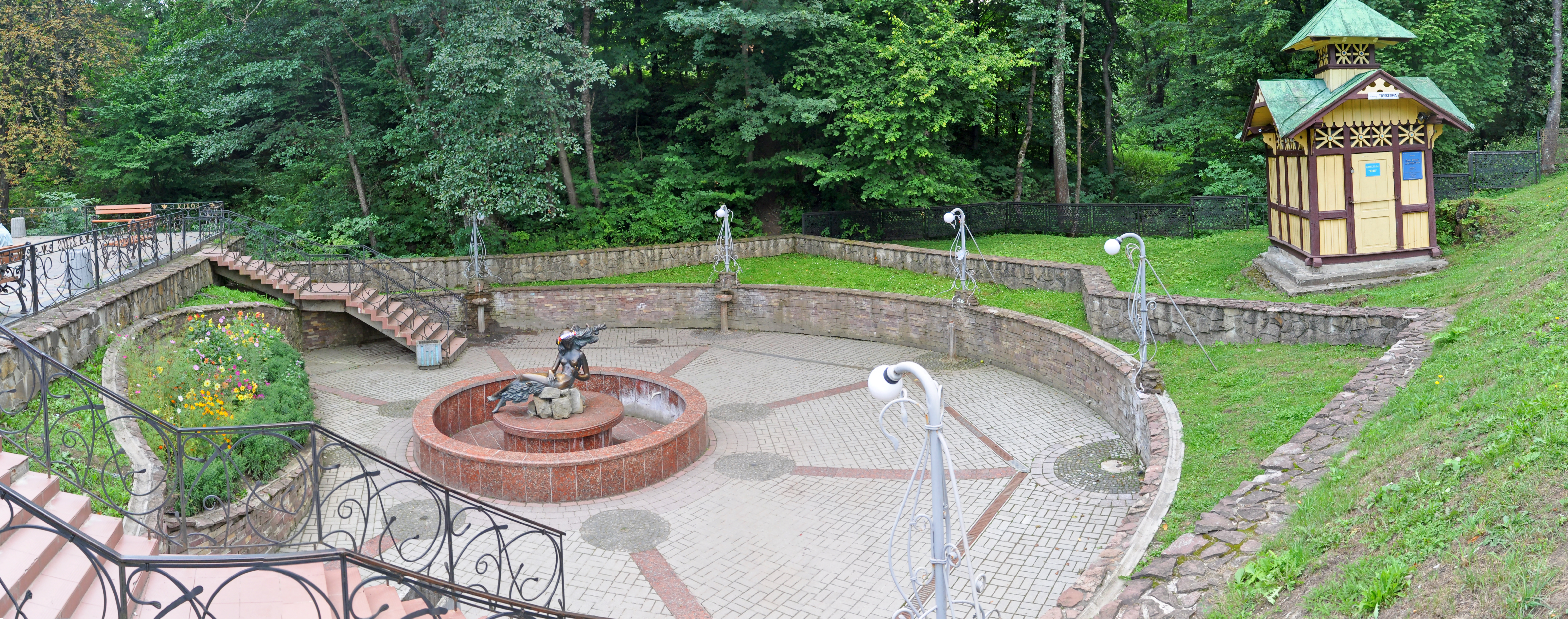 Джерело № 11 (колишня «Юзя») курорту «Трускавець», м. Трускавець